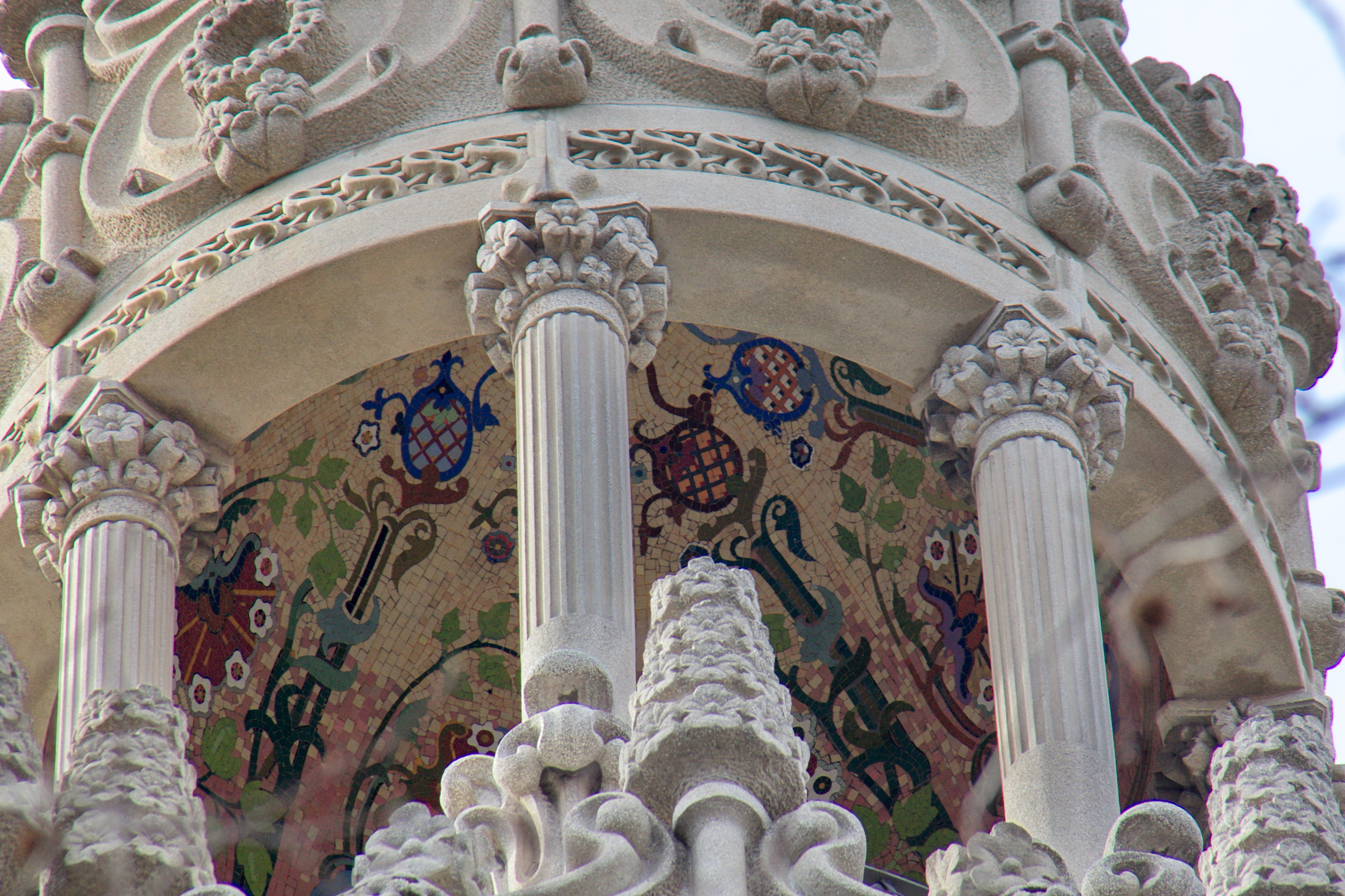 Casa Lleó Morera (Barcelona). Mosaic del sostre de la torre de la terrassa